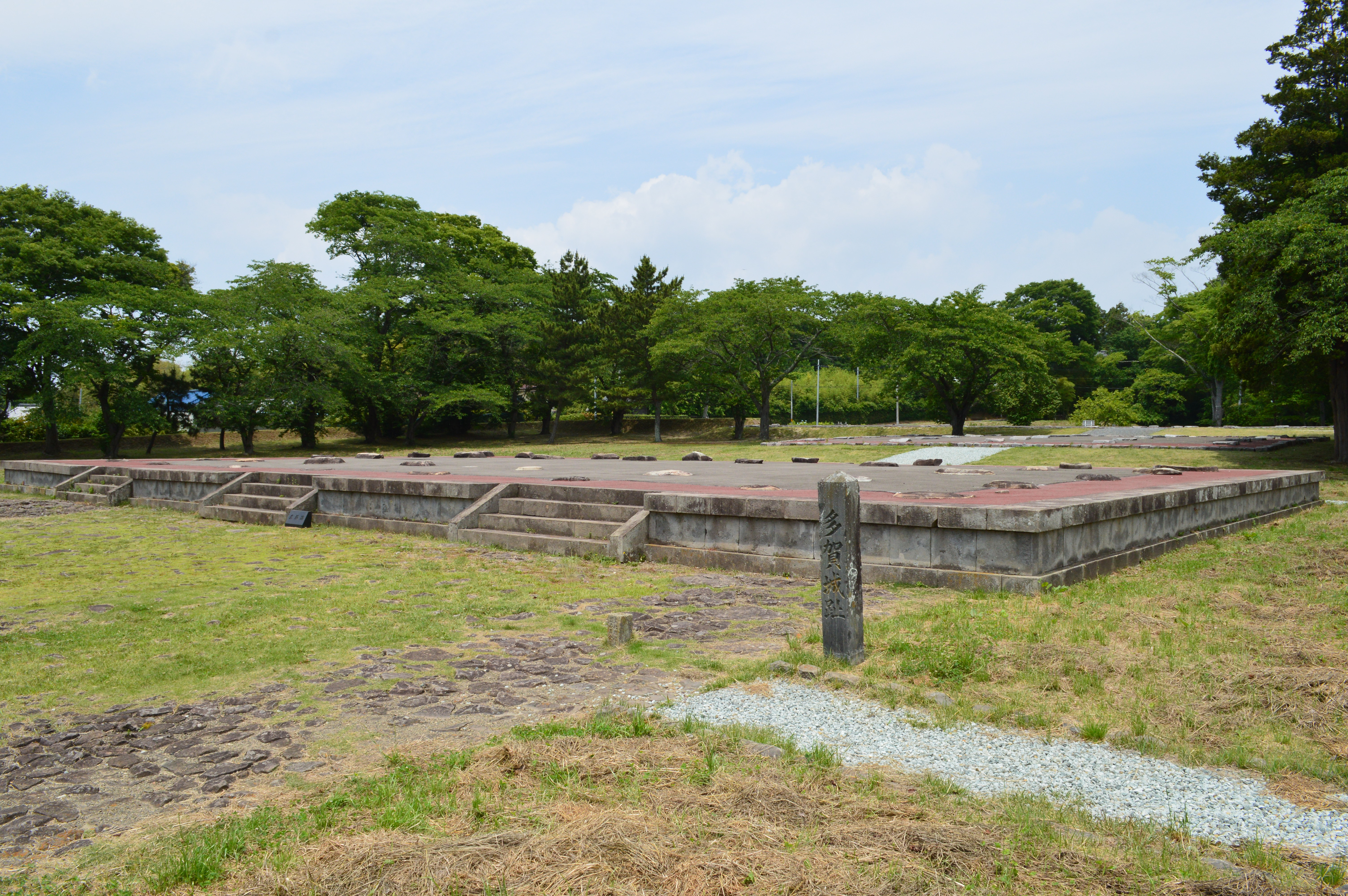 多賀城政庁跡 正殿